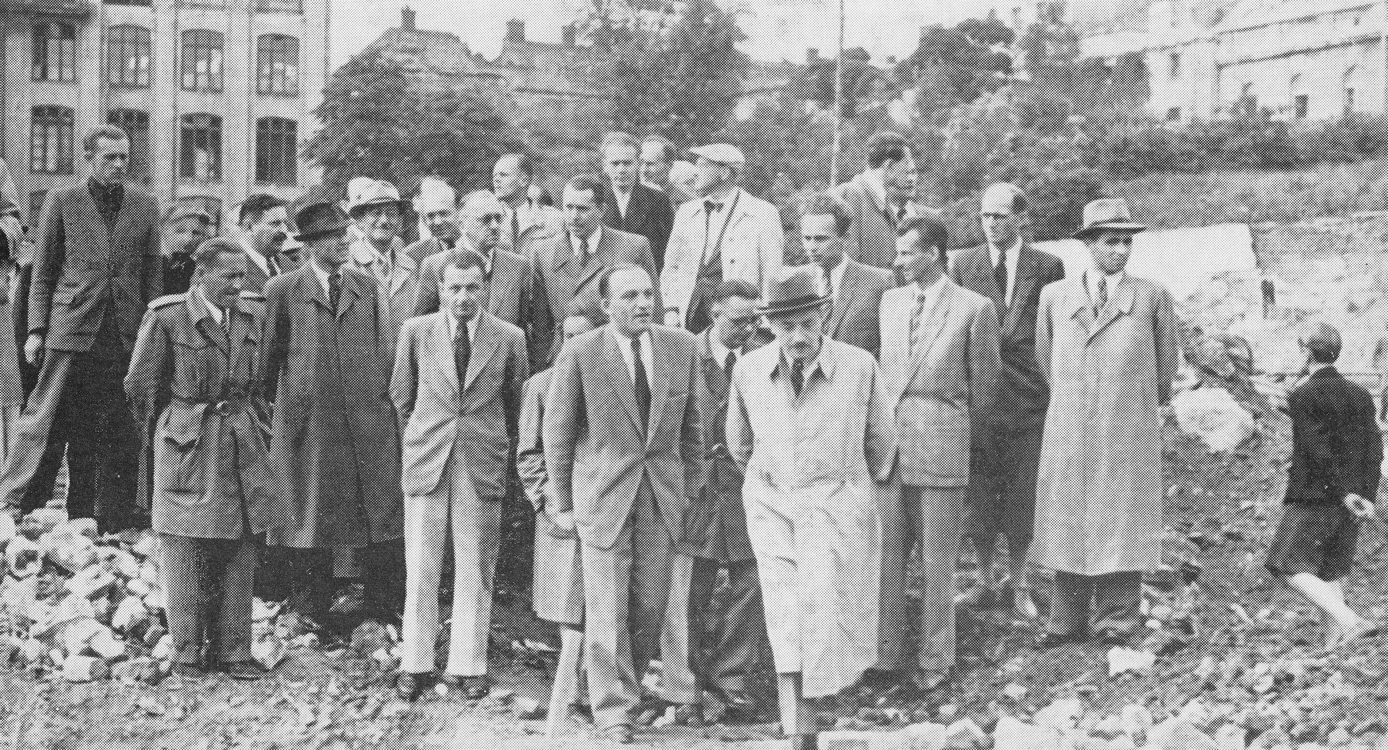 Prezydent Bolesław Bierut i minister odbudowy Michał Kaczorowski (w głębi w okularach) z grupą architektów warszawskich podczas zwiedzenia terenu pod budową przyszłej trasy W-Z